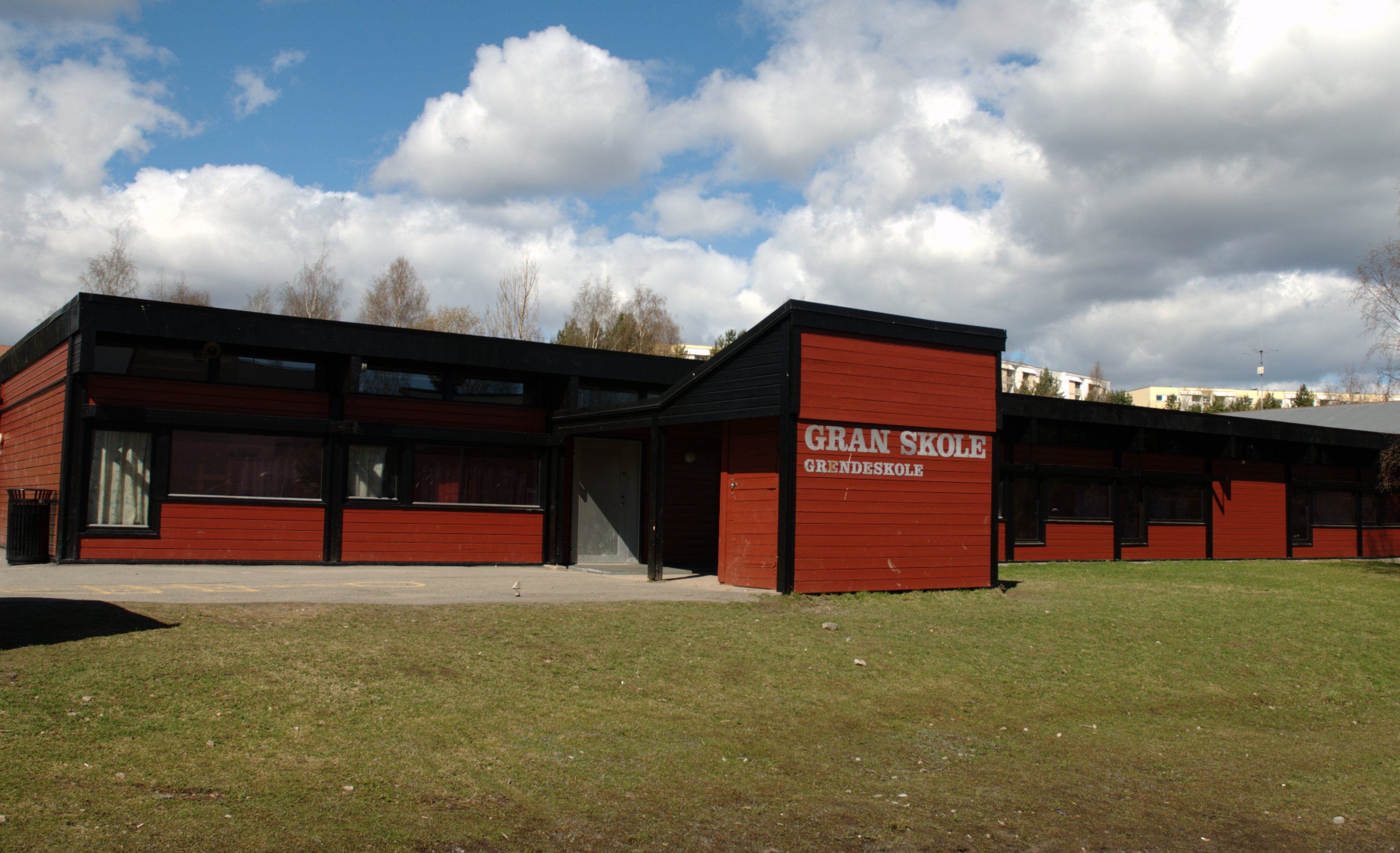 Gran skole (Kunnskapssenteret Gran skole) er en barne- og ungdomsskole i Oslo.